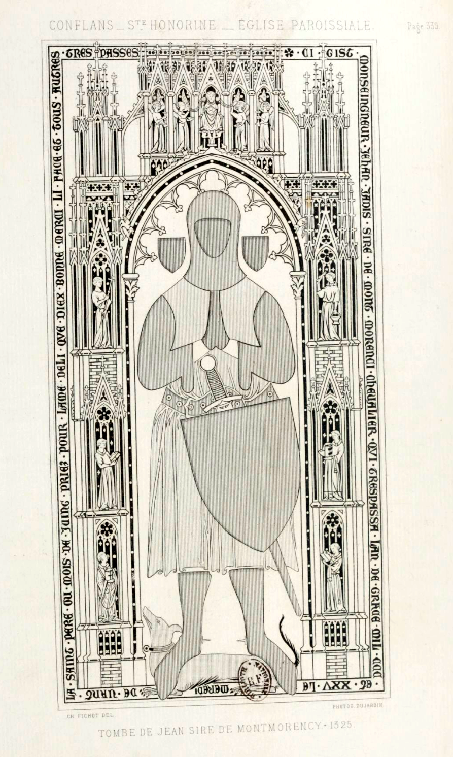 Dalle funéraire de Jean Ier de Montmorency, vers 1325.